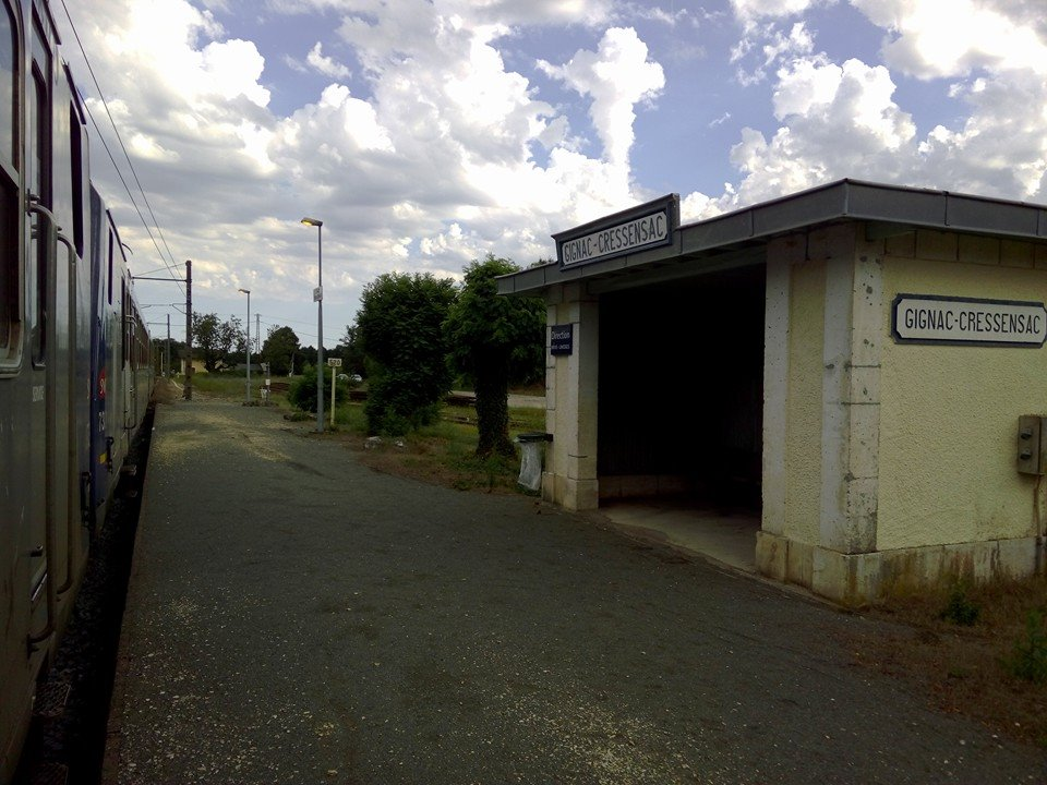 Gare Gignac Cressensac en 2015